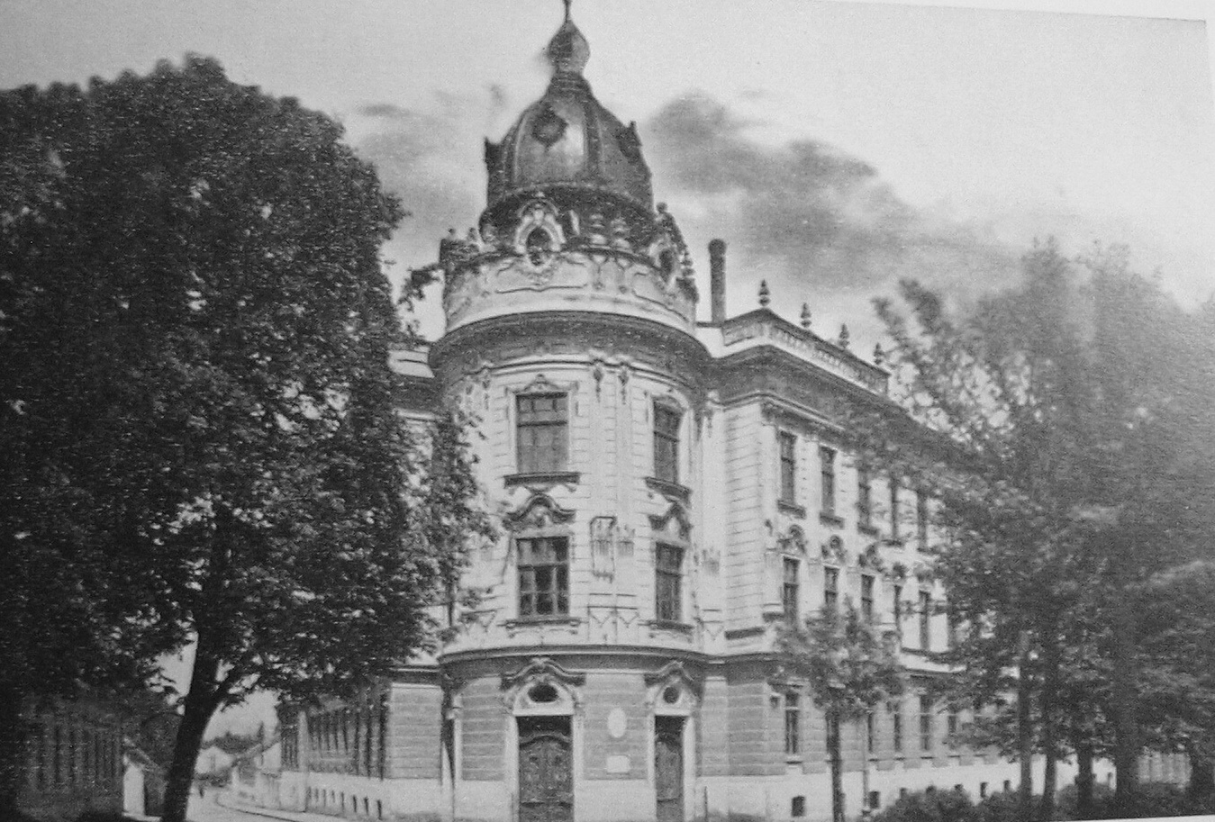 Gymnázium 1930(Vyškov- czech republic)